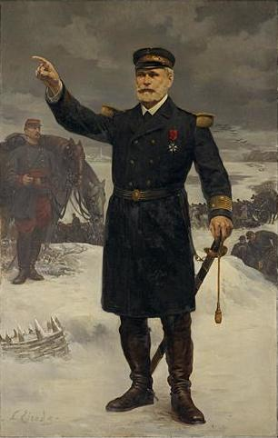 Rolland, commandant de la place de Besançon en 1870-71 dirigeant la construction des redoutes du camp retranché